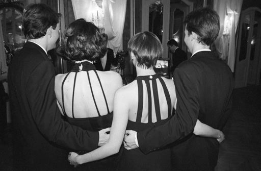 Gäste auf dem Chrysanthemenball im Deutschen Theater München